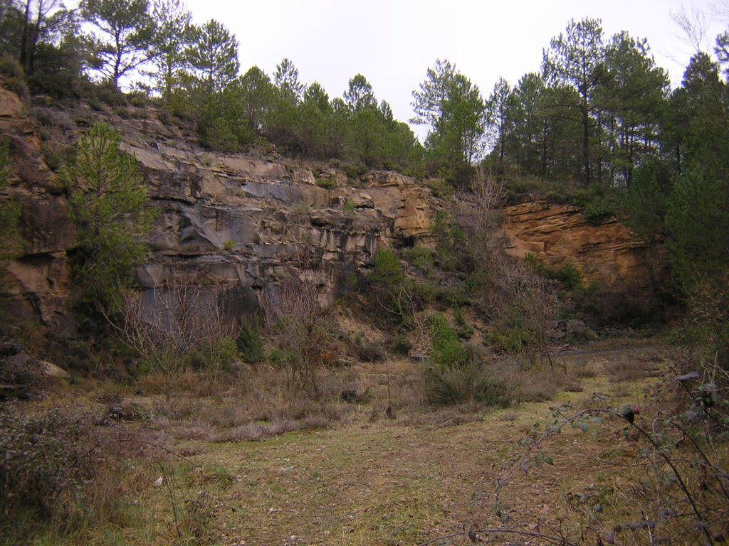 La Pedrera de la Colònia